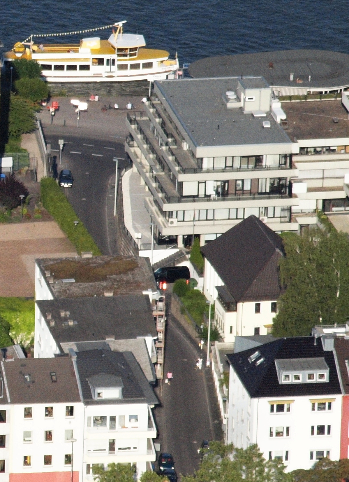 Erste Fährgasse, Bonn: Luftaufnahme